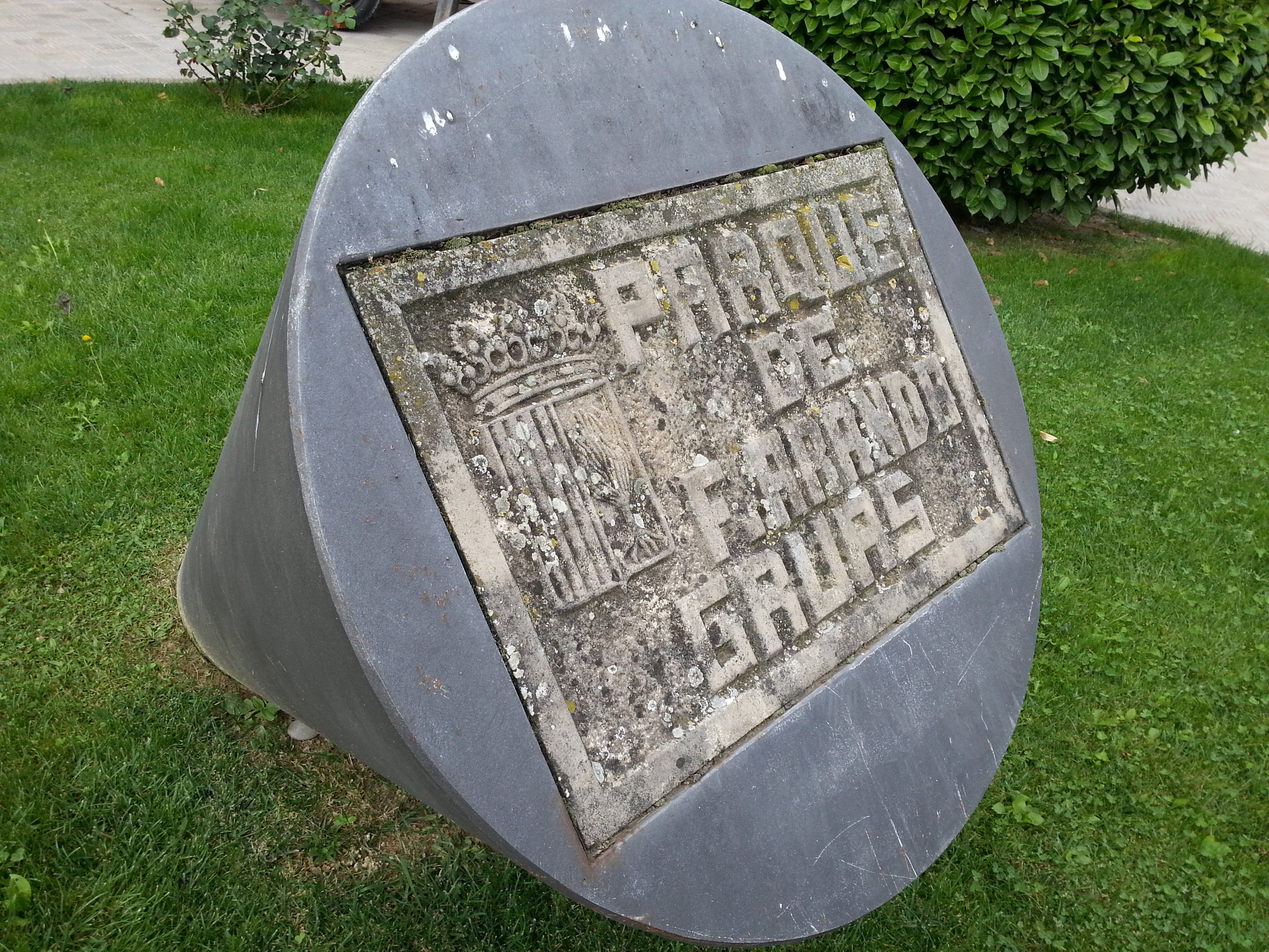 Parque dedicado al motorista Fernando Aranda Gruas, en Tamarite de Litera.